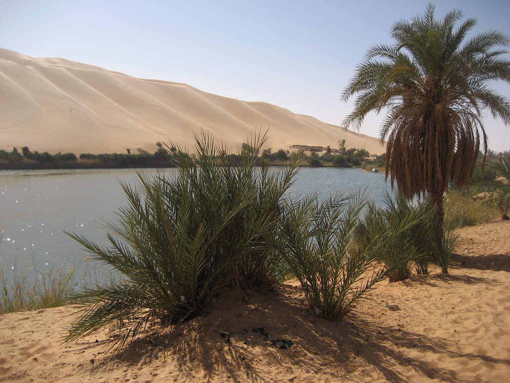 Lake Gaberoun (Daouda) in the Libyan Sahara